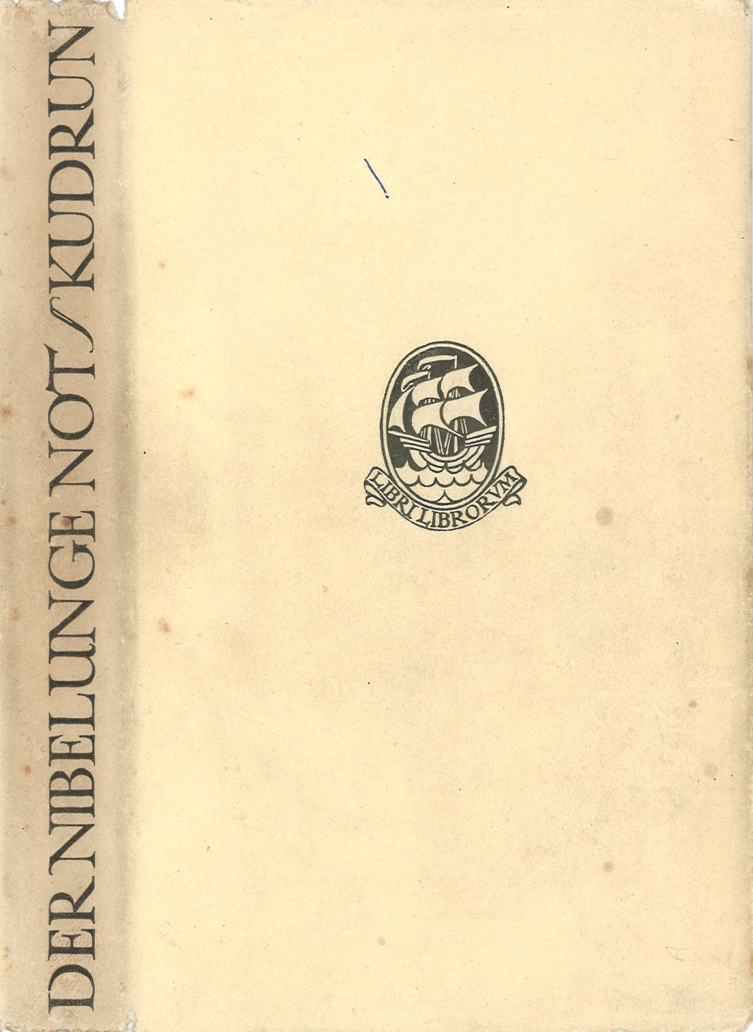 Dust wrapper for the "Nibelunge Not", Insel Verlag